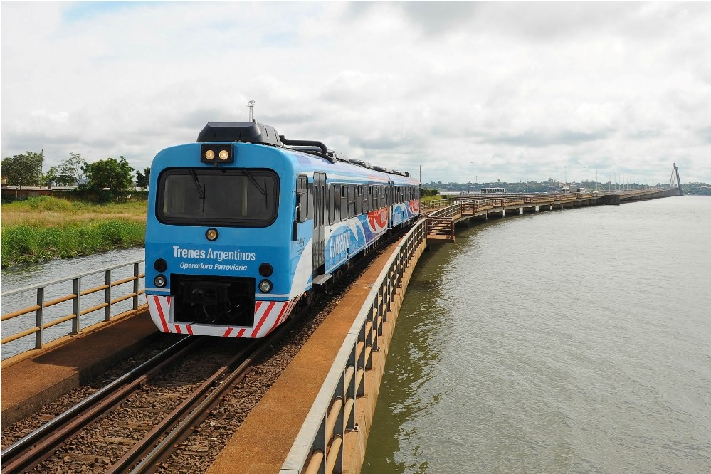 Tren de pasajeros enternacional